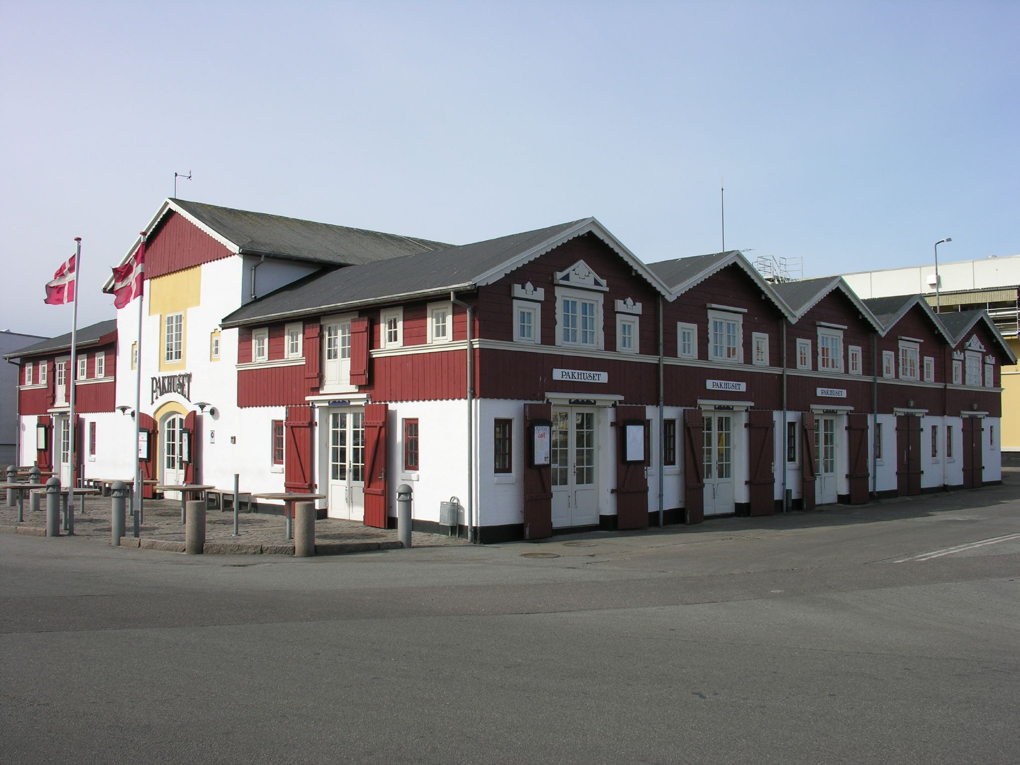 Fiskepakhusene Buildings in Skagen, Denmark